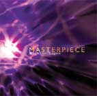 A Banchieri Énekegyüttes 2003-as CD lemeze